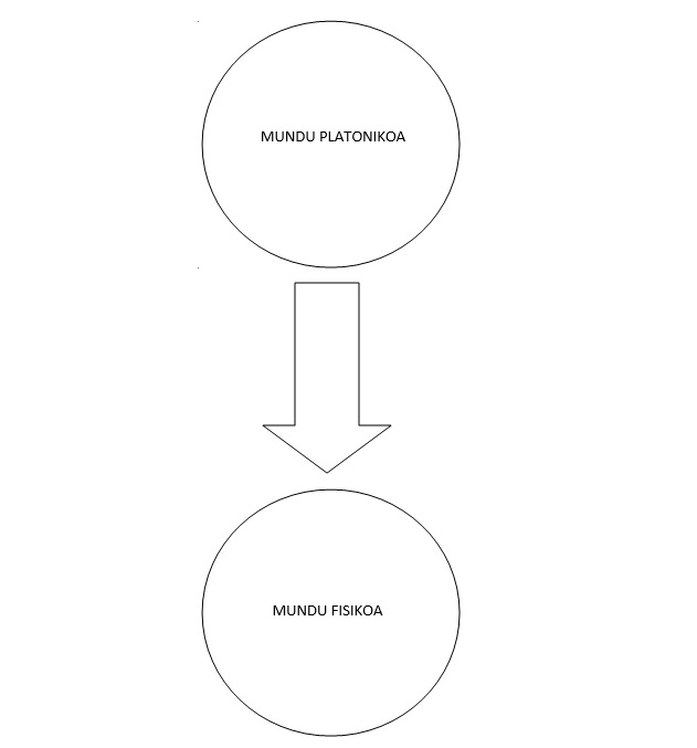 Errealismo platonikoa